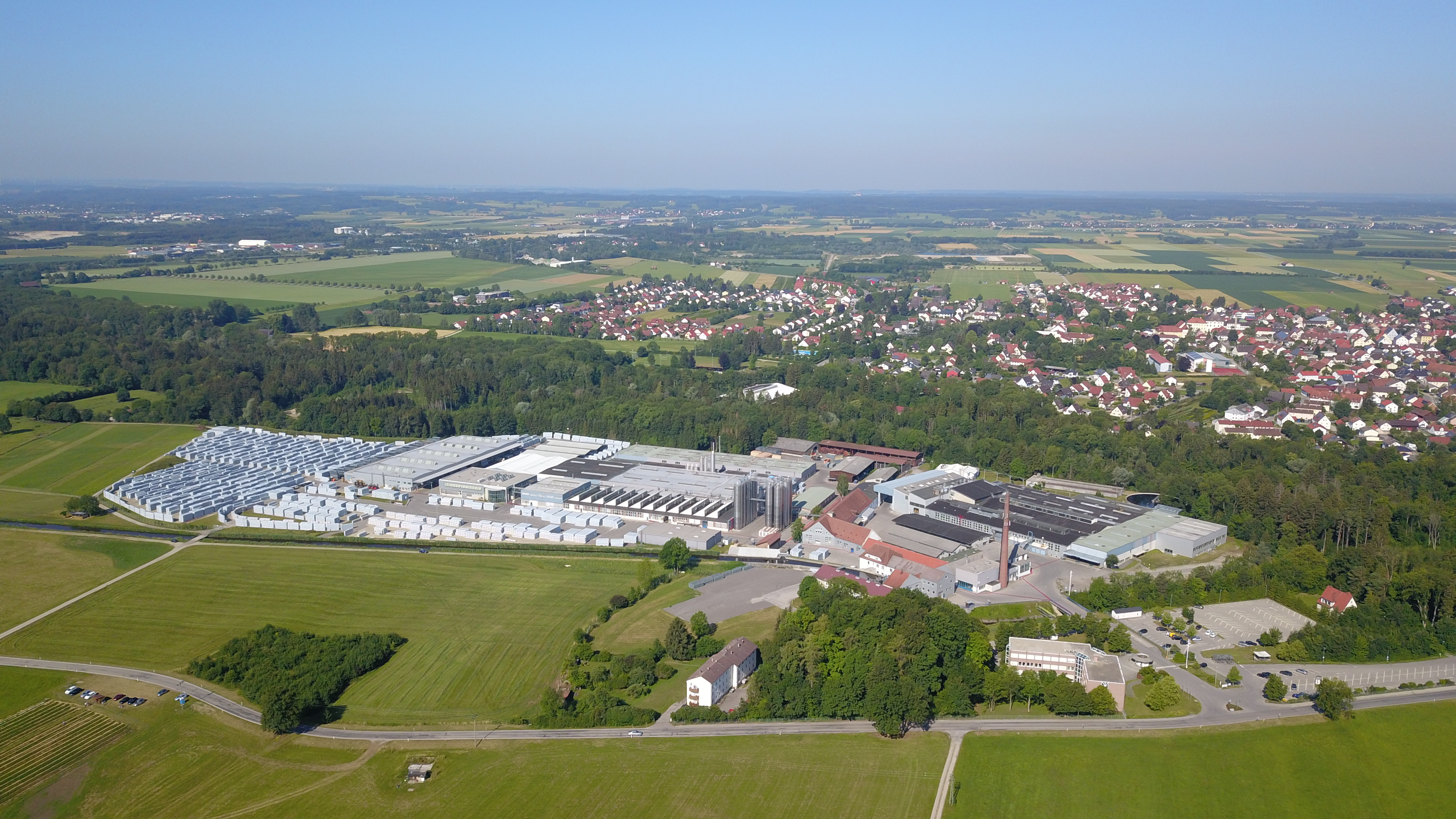 Werk der Salamander Industrieprodukte (SIP) in Türkheim